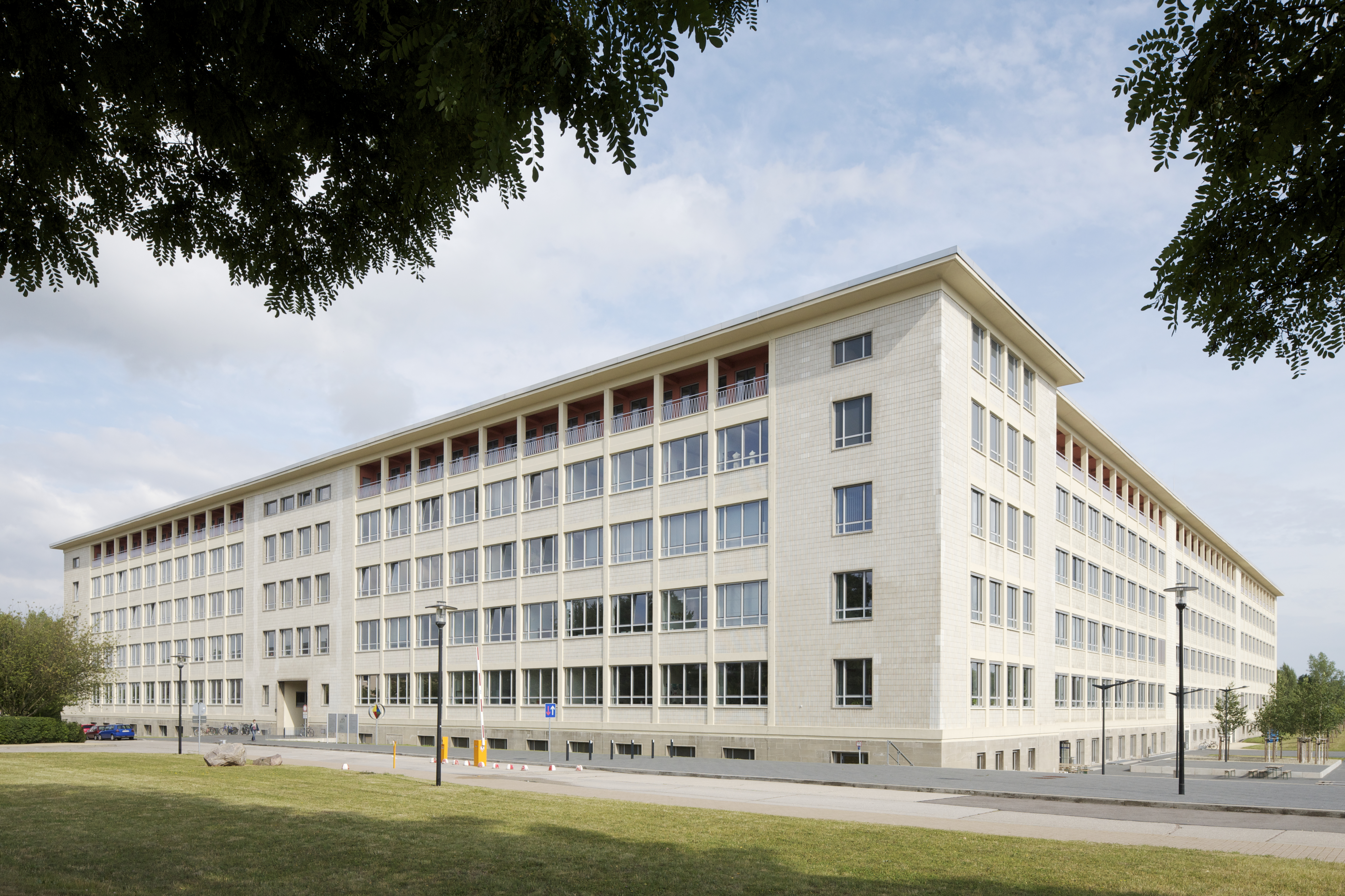 Hochschule Merseburg im südlichen Sachsen-Anhalt, Ansicht des Hauptgebäudes